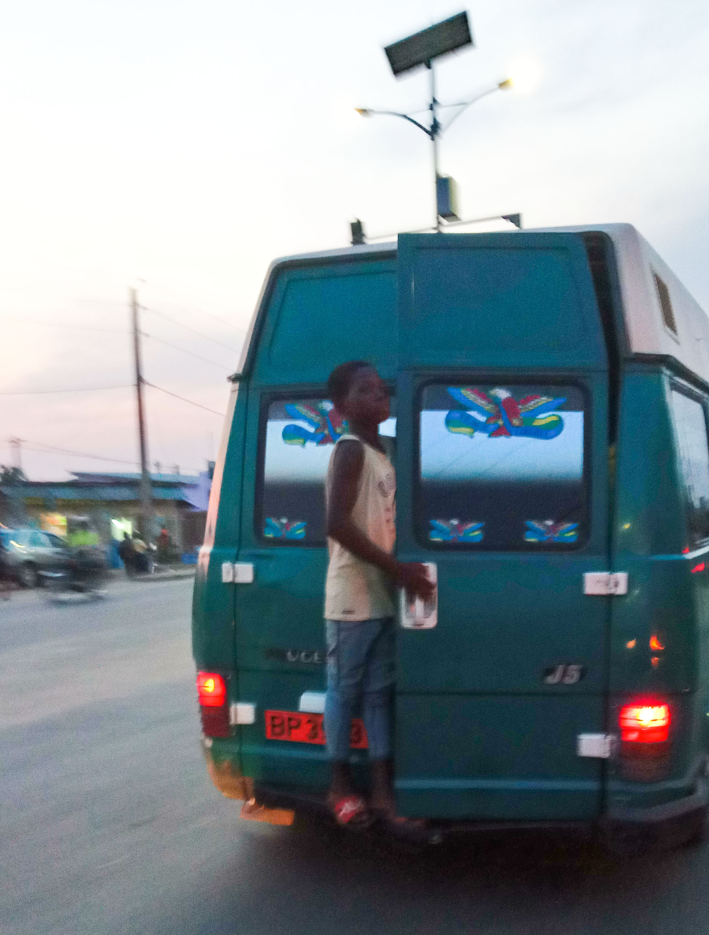 un enfant racoleur aidant son patron à collecter les sous a la descente